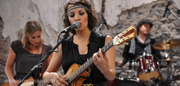 Gaby Moreno en Acceso Total.